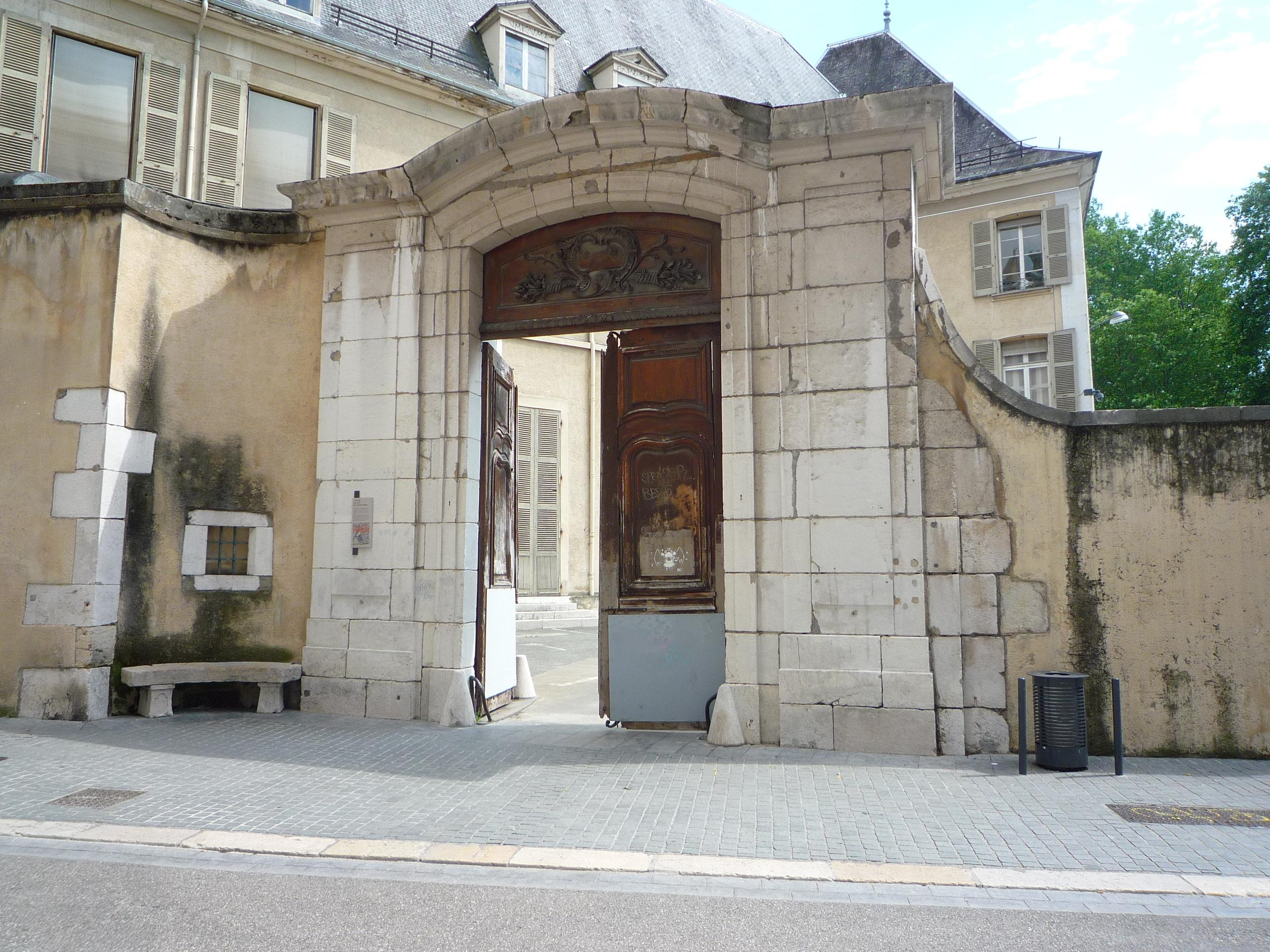 Portail Hôtel de Lesdiguières percé en 1749 - Grenoble